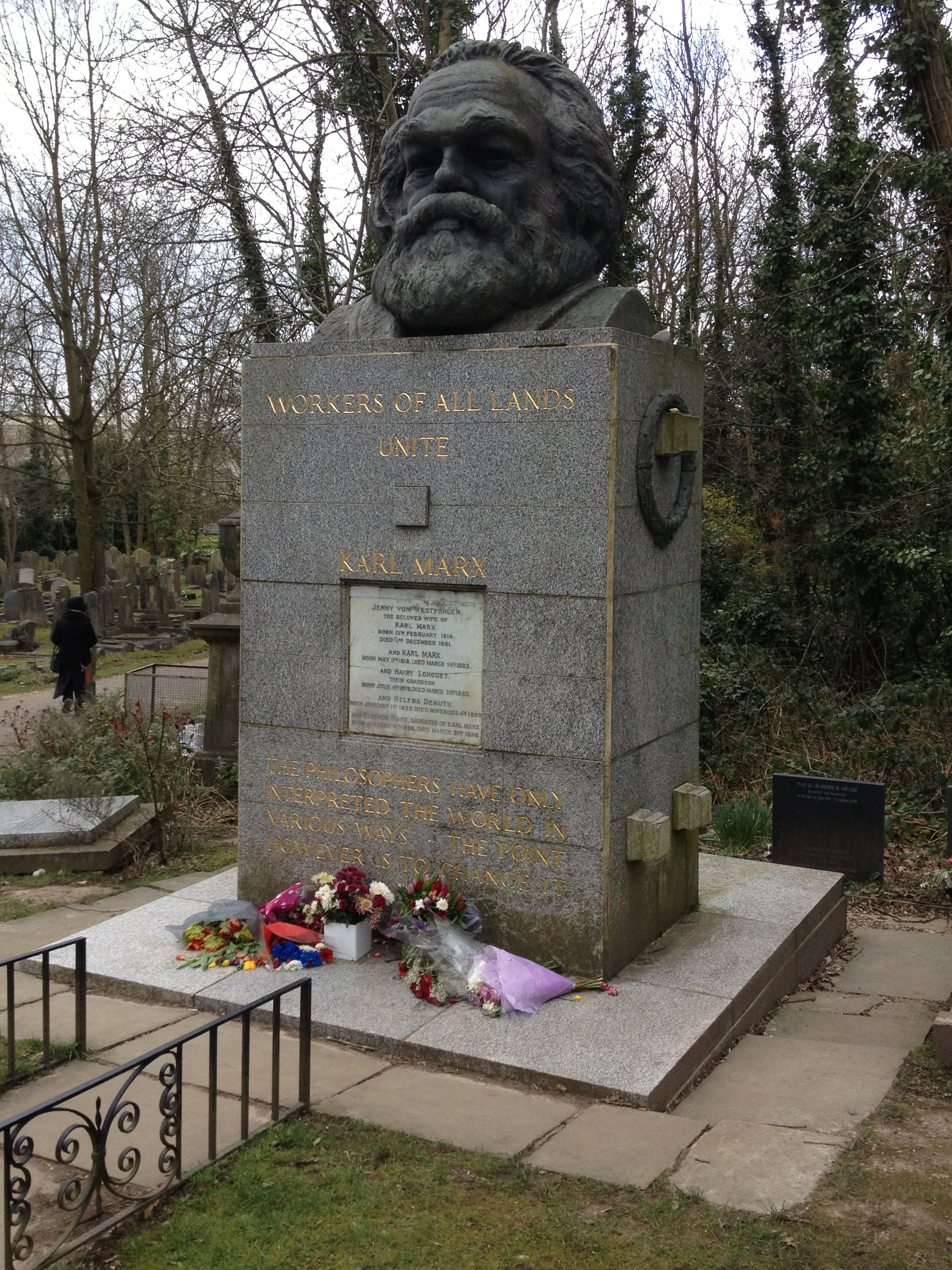 Grab von Karl Marx, London